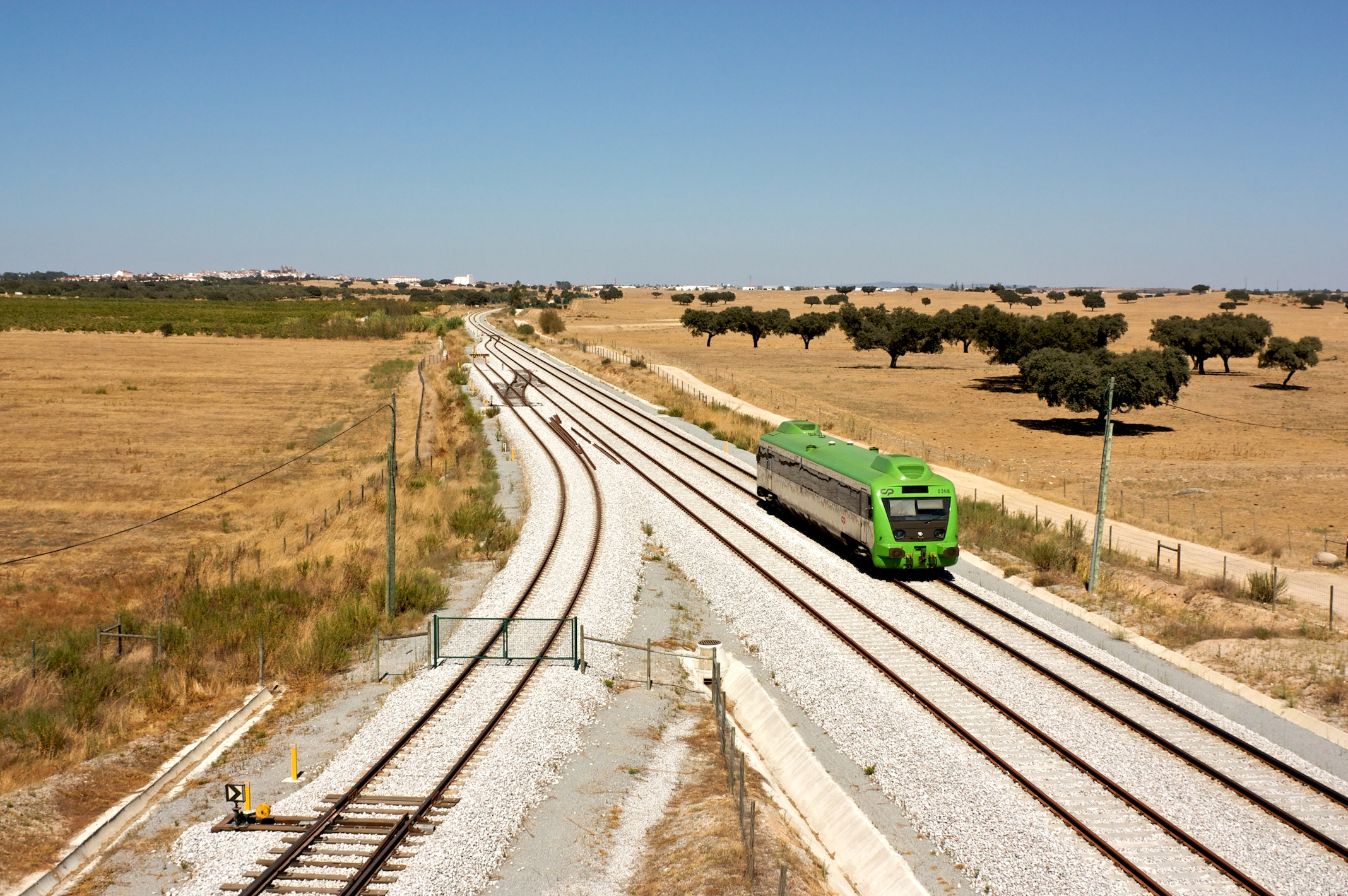 Tipo: Comboio Regional 6708/9 [Évora - Beja] Local: Estação de Monte das Flores [Linha de Évora, PK 111] Data e hora: 3 de Setembro de 2009 [15h31] Material: Automotora 0368 [Unidade Simples Diesel - Allan Renovada]